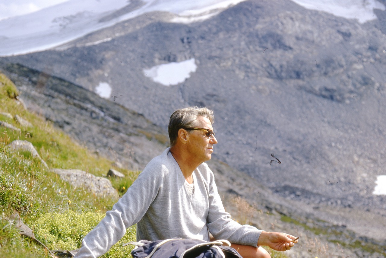 Rolf Edberg, svensk författare, politiker och diplomat. Foto från Jörgen Edbergs fotoarkiv; motiv från Jotunheimens nationalpark